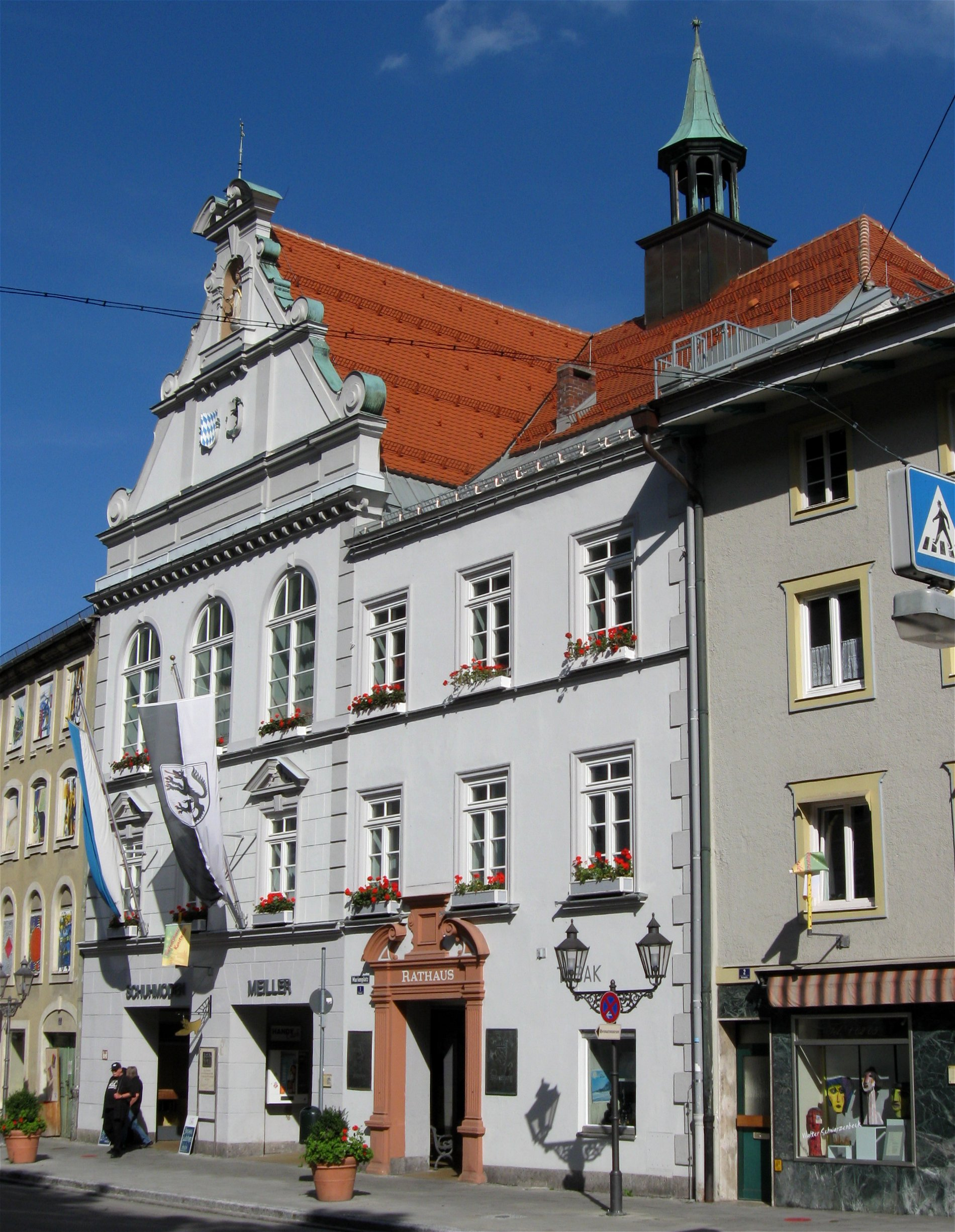 Marienplatz 1; Rathaus, stattlicher Bau mit Neurenaissance-Giebel, errichtet 1890.